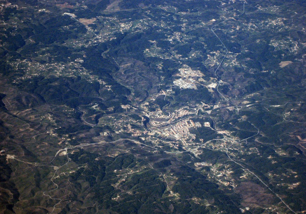 Serta vista de aertostato